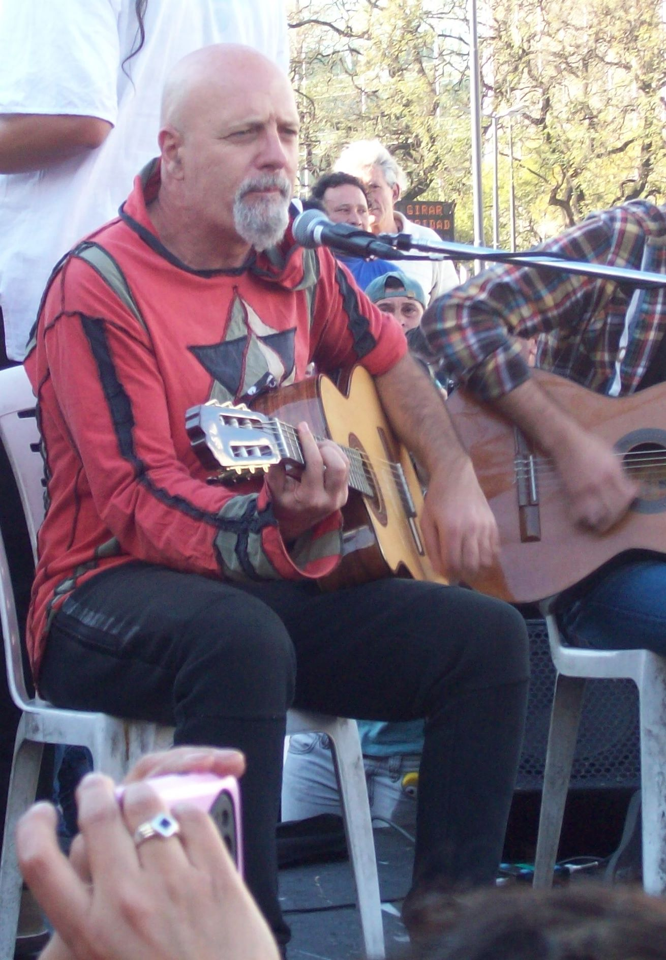 El músico argentino Gustavo Cordera tocando en el acampe Qom en la Avenida 9 de Julio y Avenida de Mayo, en la ciudad autónoma de Buenos Aires.